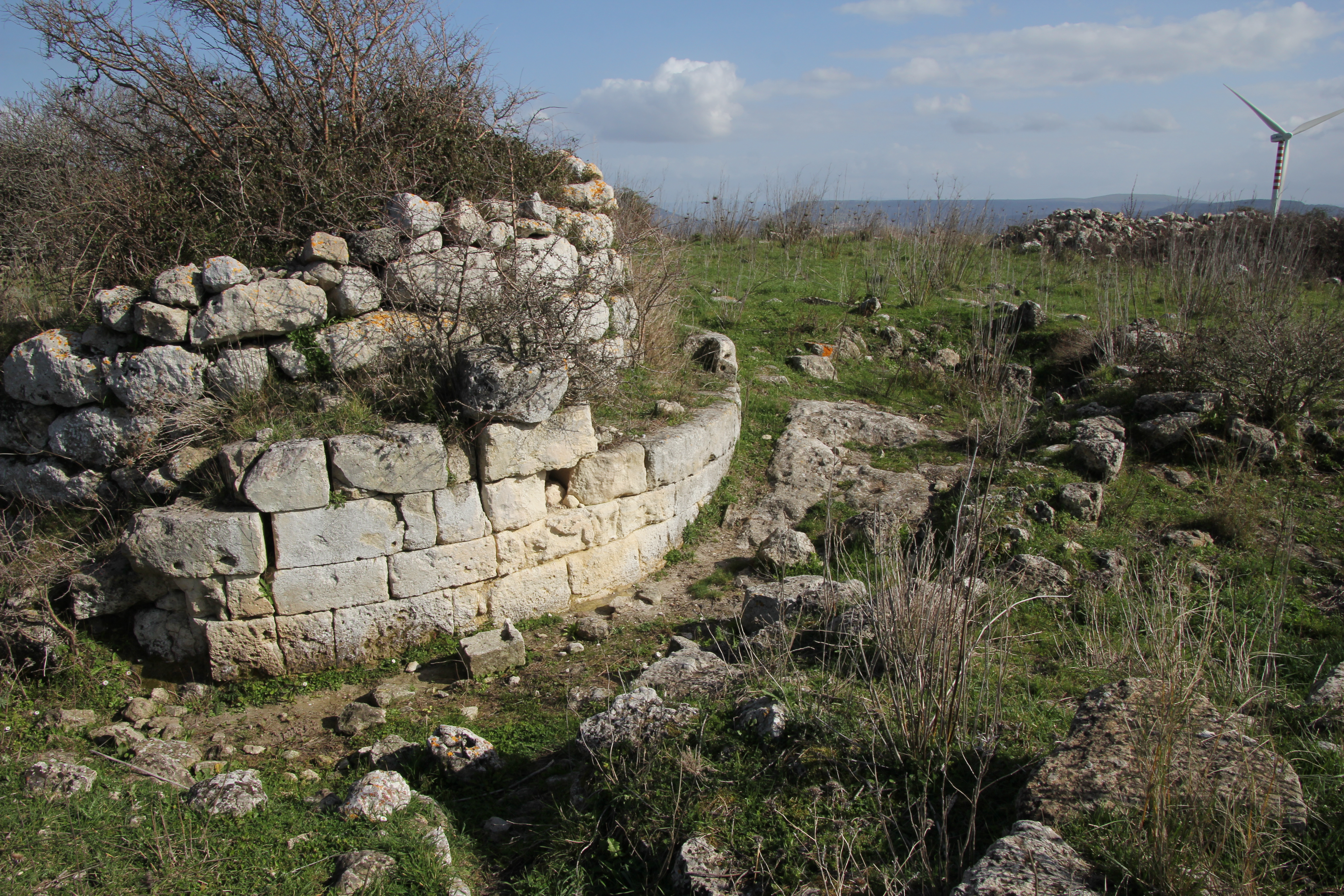 Florinas, area archeologica di Punta Unossi